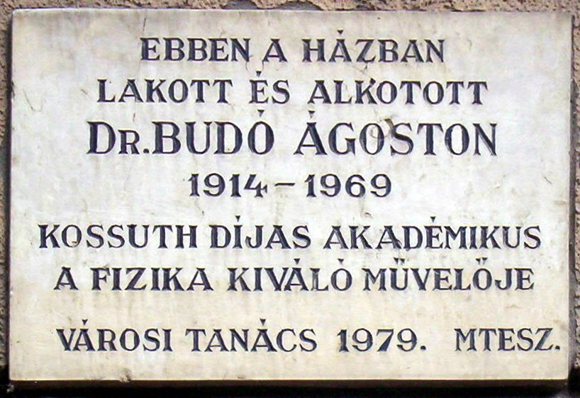 Budó Ágoston (1914–1969) emléktábla Szegeden